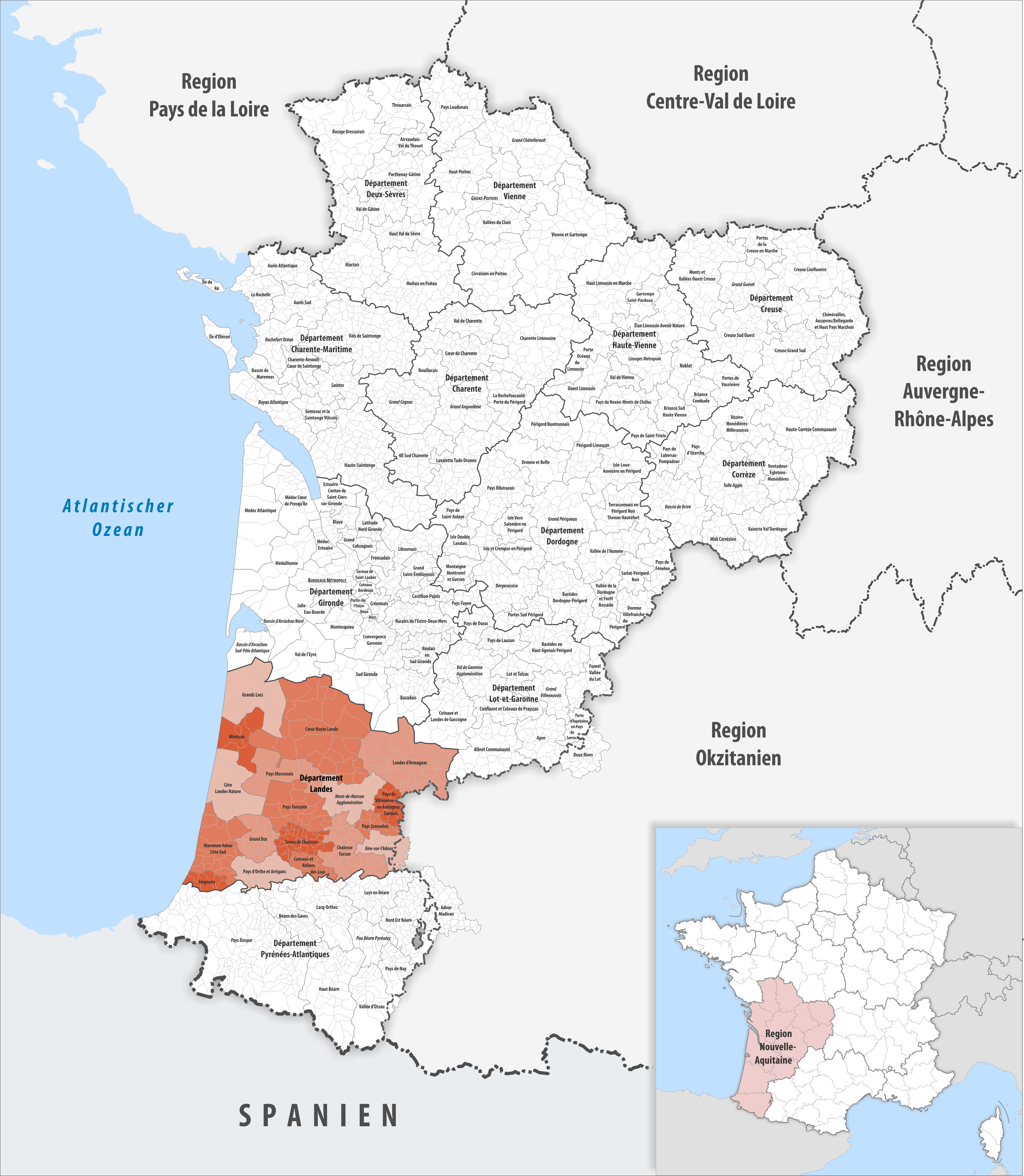 Gemeindeverbände im Département Landes